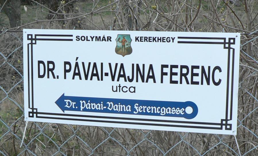 Pávai-Vajna Ferenc utca Solymáron